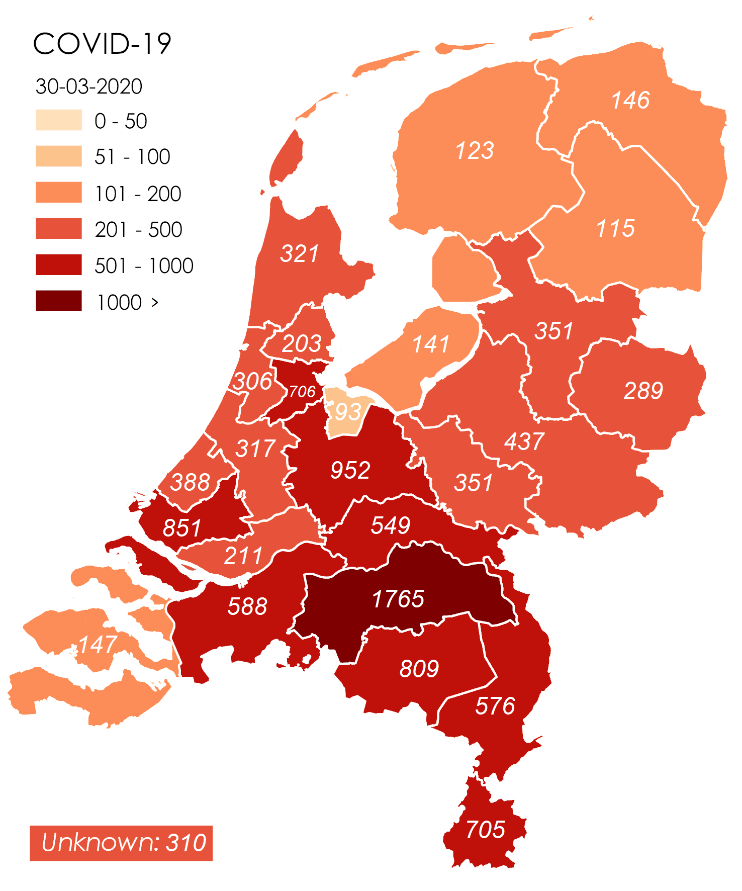 Cijfers via (d.d. 30-03-2020)